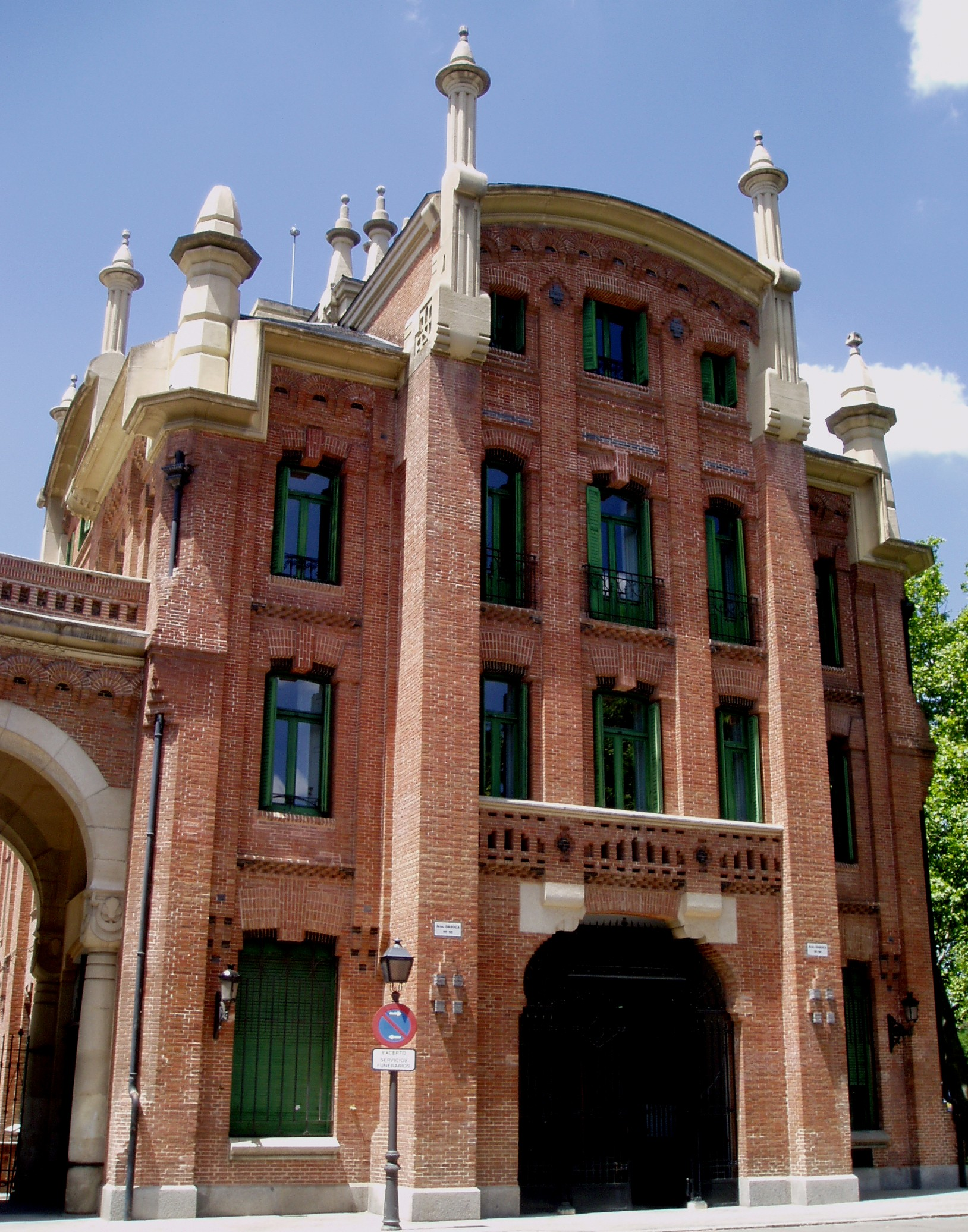 Edificio de oficinas. Cementerio de la Almudena. Madrid. España.